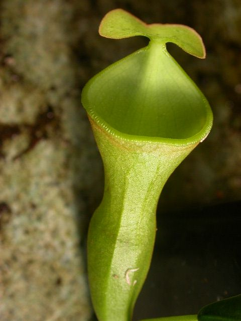 Cultivated N. campanulata. -Jeremiah